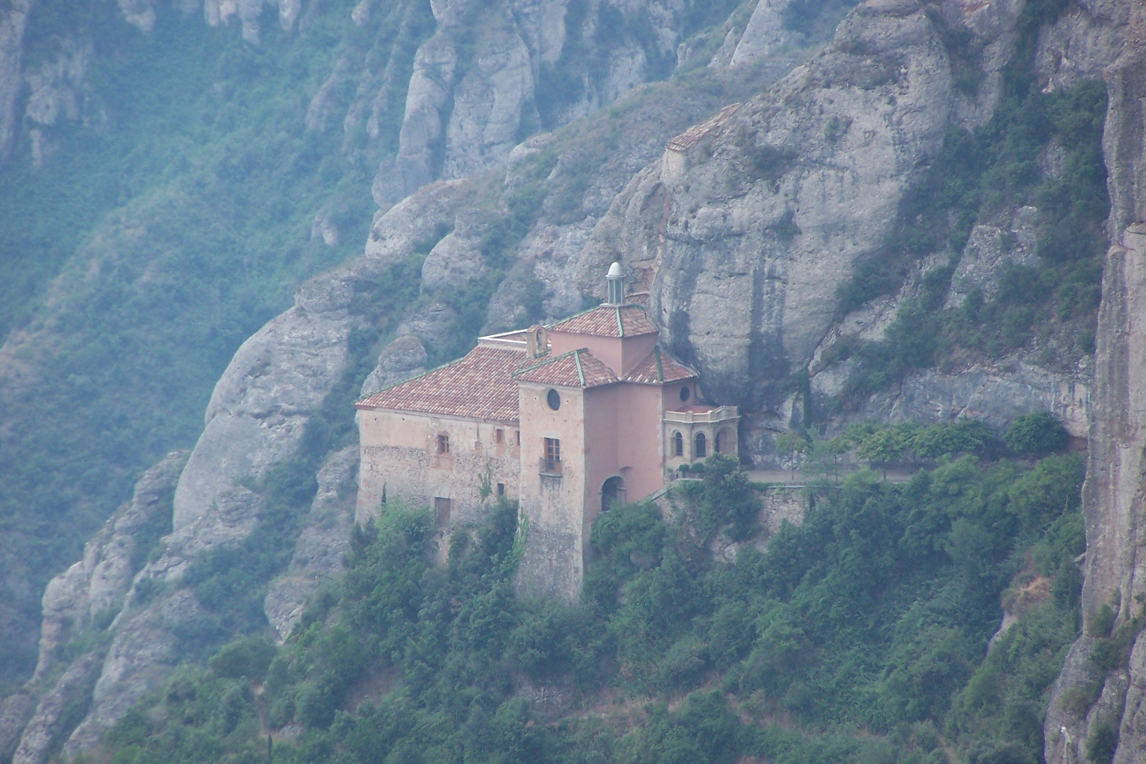 Santa Cova Chapel, in Montserrat, Catalonia/Catalunya. Eigen werk, 30-04-2006